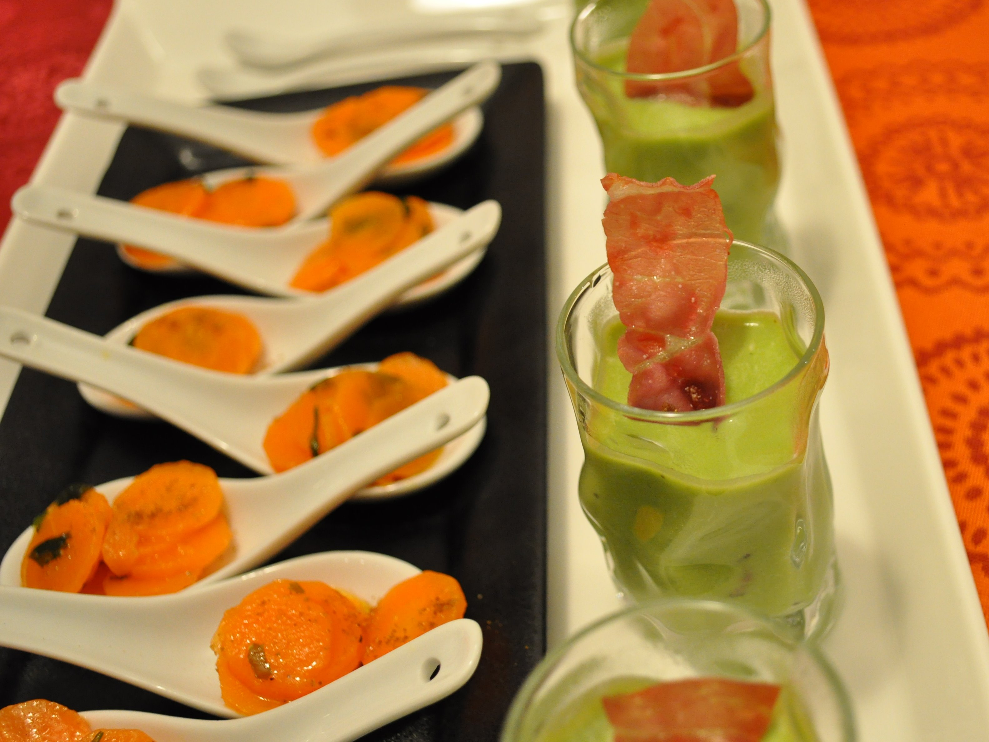 Verrine de soupe de petits pois à la menthe accompagnée de cuillère de carottes à la coriandre